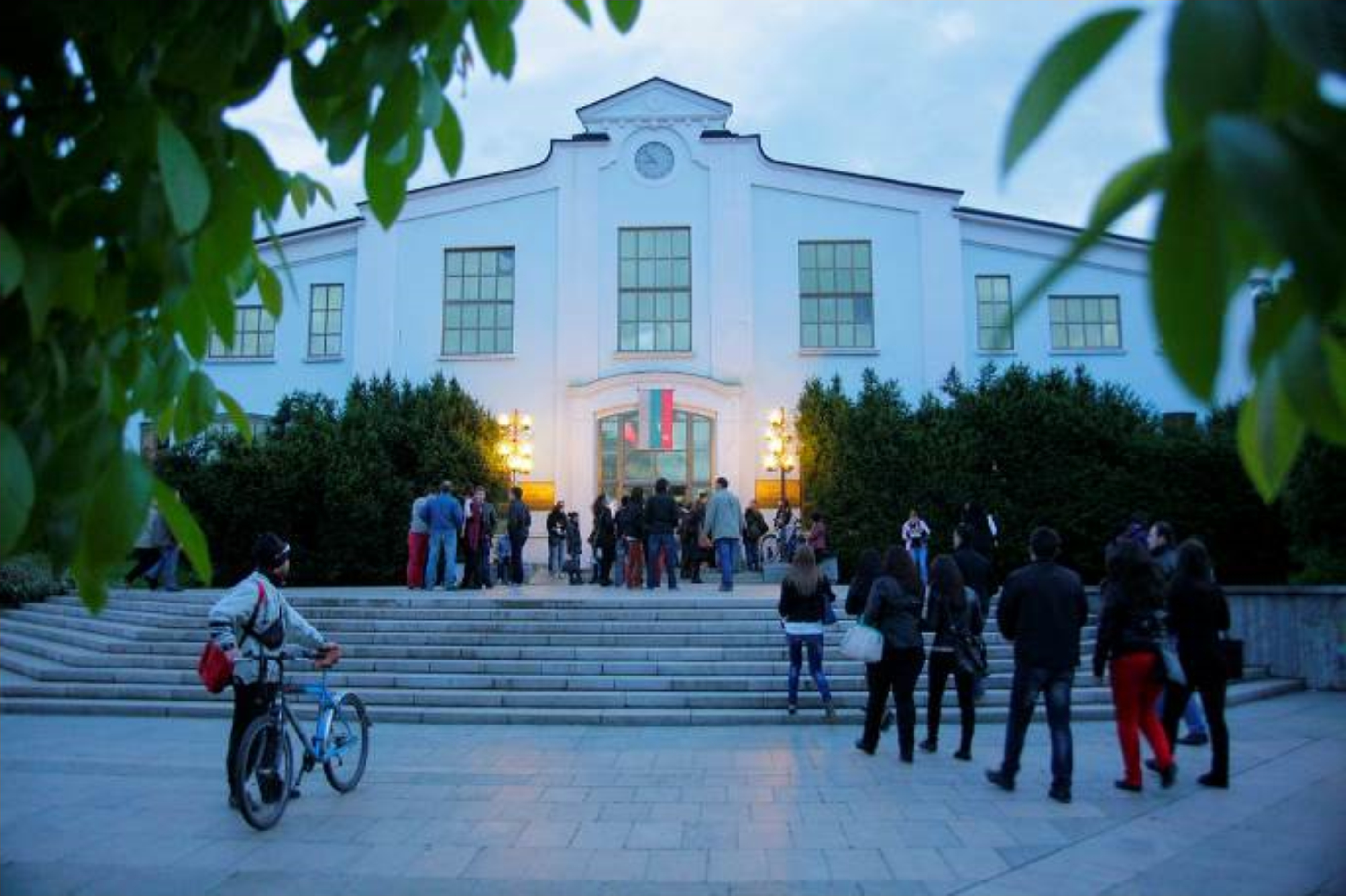 Нощ на музеите 2016 год.